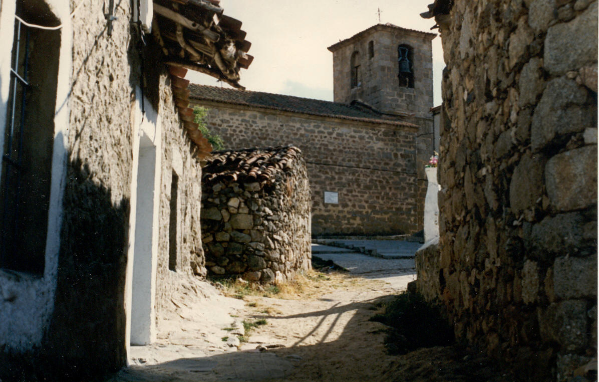 Vista de la iglesia de Pascualcobo desde una calleja